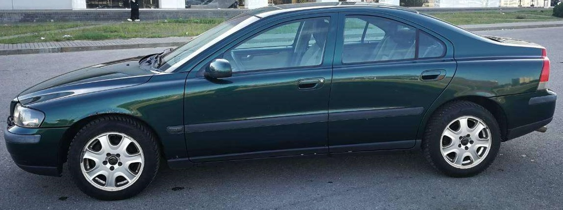 Volvo S60